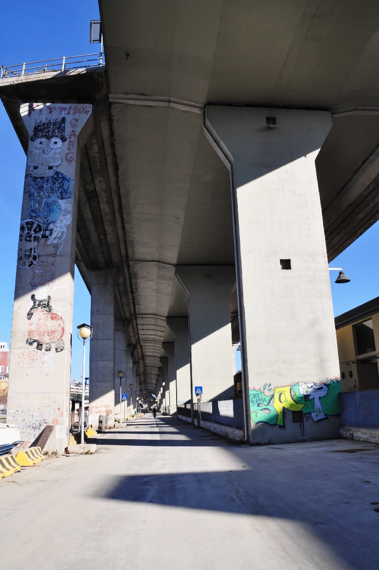 der Hafen von Pescara Dez 2013